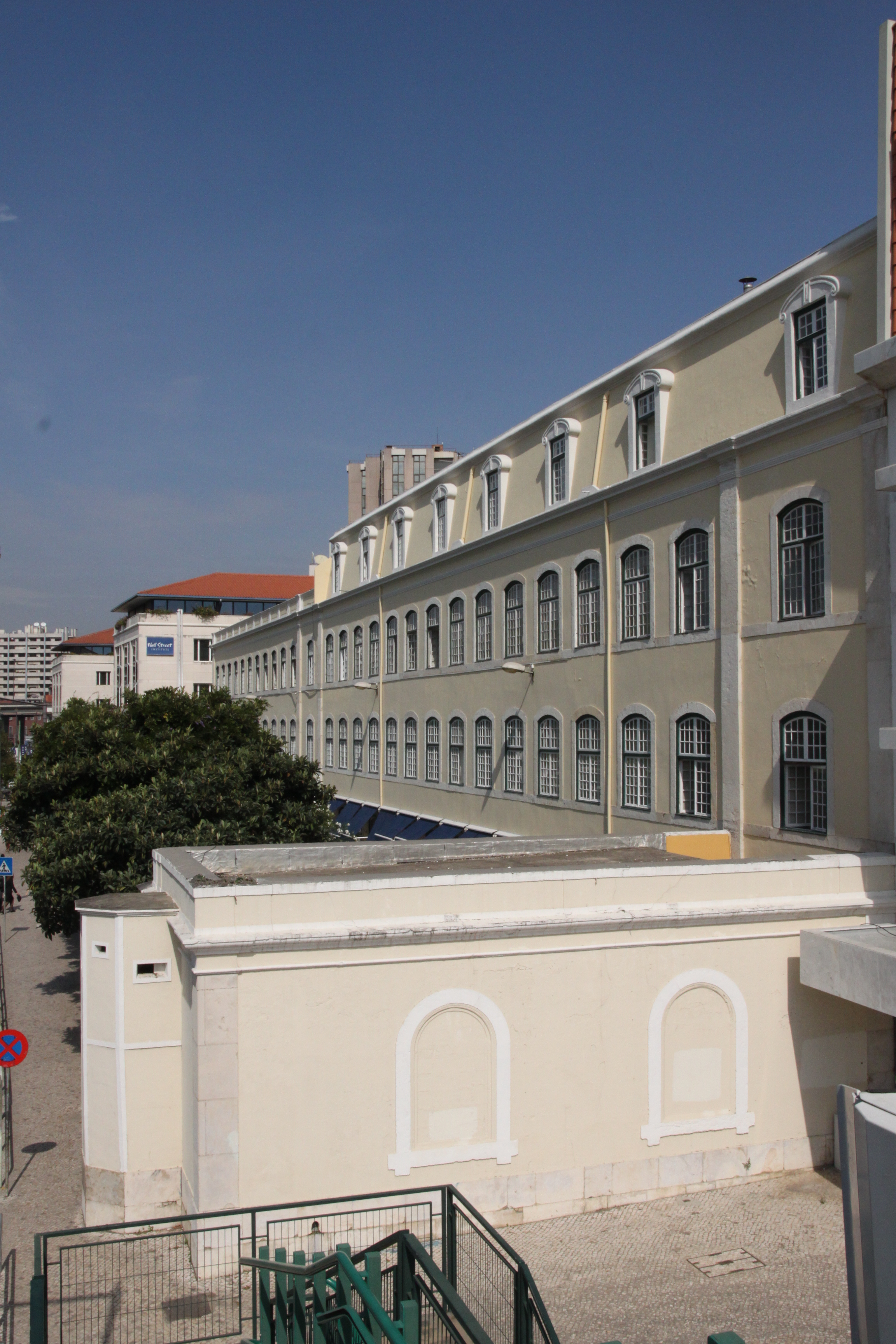 Fábrica de Fiação e Tecidos / Quartel do Regimento de Engenharia n.º 2 / Edifício da Universidade Lusófona This file was uploaded for Wiki Loves Monuments in Portugal with the unique identifier 97019958.